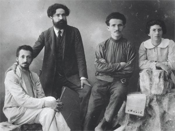 מערכת האחדות, מר בן צבי, מר זרובבל, בן גוריון, גב' רחל ינאית - בן צבי.